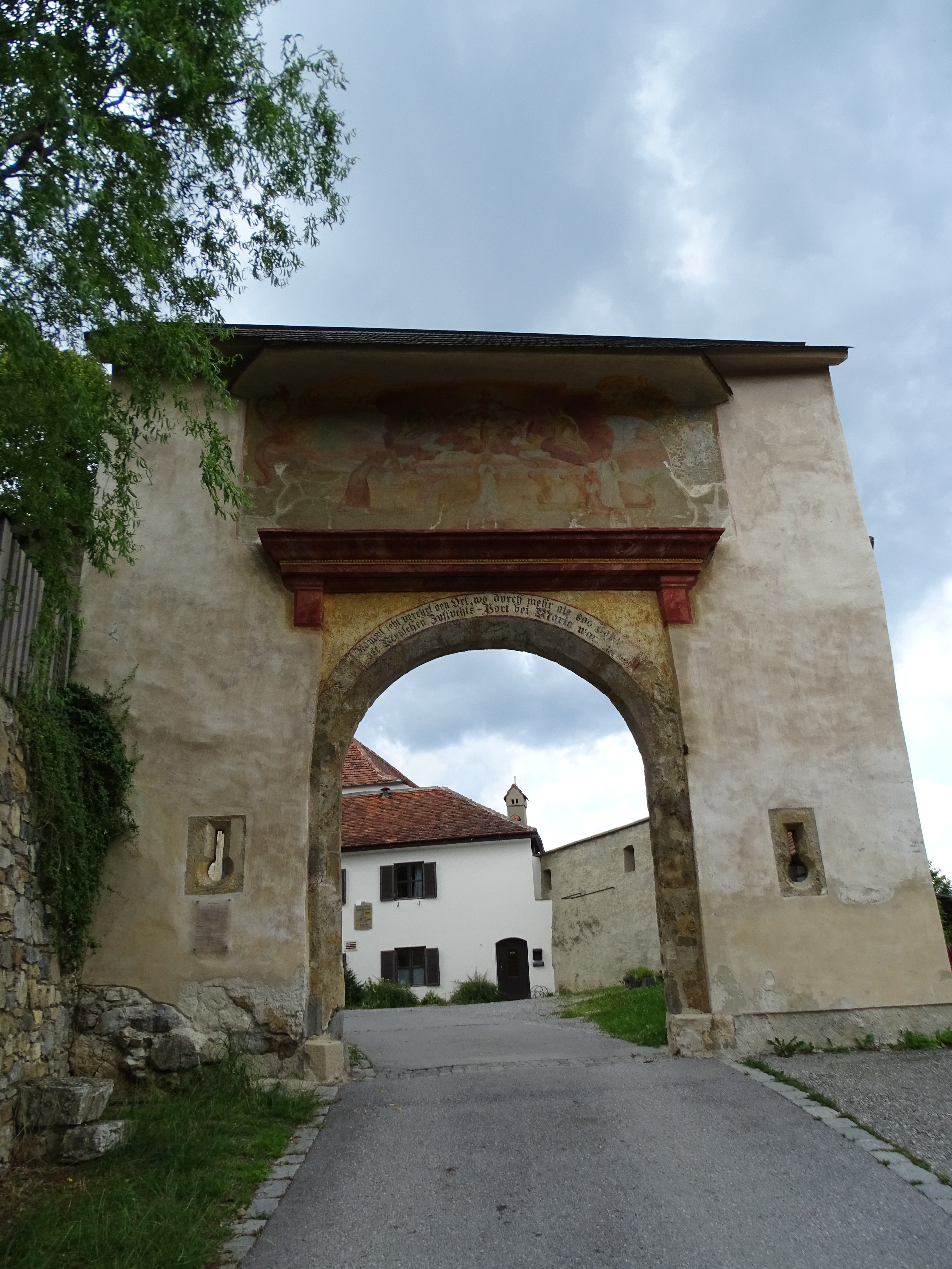 Das Haupttor zum Kirchhof der Wallfahrtskirche Maria Straßengel